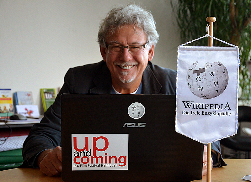 Der Fotograf Marc Theis am 19. November 2015 hinter einem Rechner im Wikipedia-Büro Hannover ...